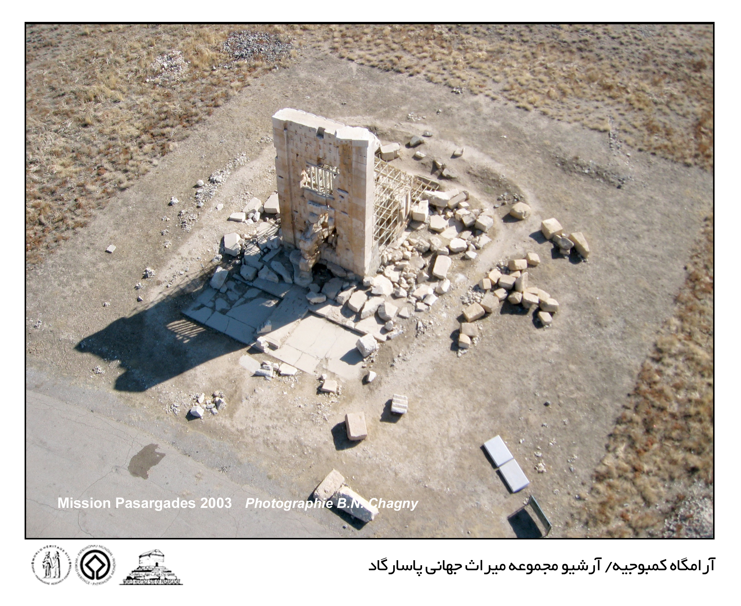 باستان شناسی